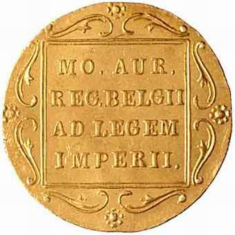 Dukat powstańczy 1831. Rewers. autor: mzopw